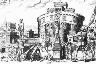 1527 SACCO DI ROMA La mattina del 6 maggio 1527, dal suo quartiere generale nel convento di S. Onofrio sul Gianicolo, il capitano generale Borbone diede il via agli assalti. In uno di questi, alla Porta del Torrione, mentre dava la scalata alle mura, egli stesso fu colpito a morte